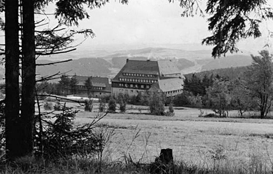 Zentralbild-Siebenhaar 21.4.1958 Das Erzgebirge Das "Große Raupennest" bei Altenberg